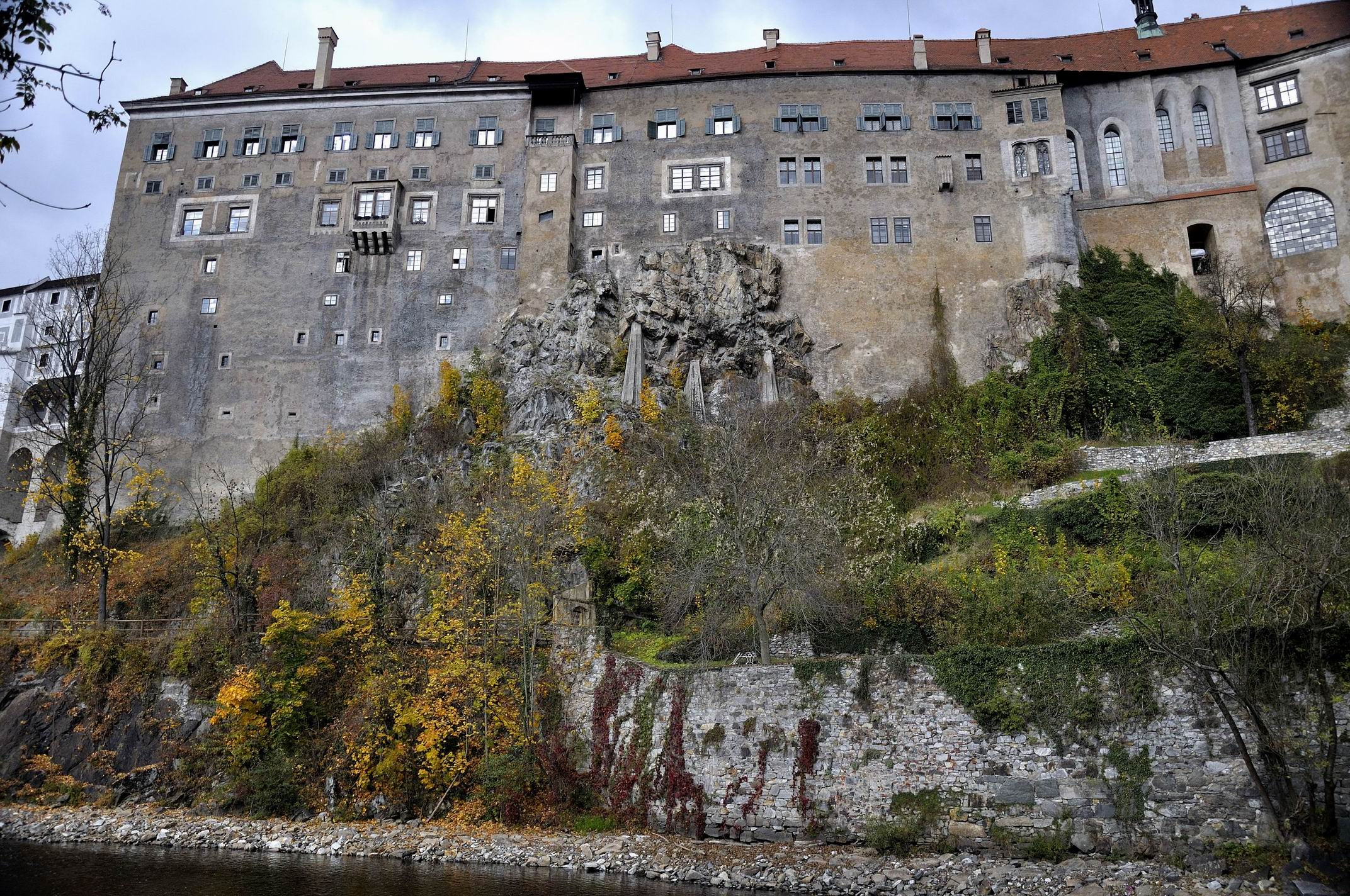 Zámek Český Krumlov, Latrán, na skalnatém ostrohu nad řekou Vltavou 46, Český Krumlov